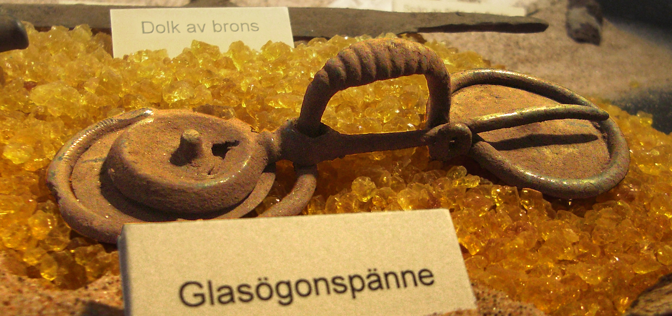 Glasögonfibula i brons funnet vid utgrävningen av den neolitiska gånggriften Firse sten (Raä-nr Falköpings östra 1:1) i september 2008. Gånggriften ligger utmed gamla Jönköpingsvägen på gränsen mellan Falköpings stad och Falköpings östra socken (f.d. Agnestads socken), Ållebergs fjärding, Vartofta härad, f.d. Skaraborgs län, Västergötland, Sverige. Modernare indelningar är Falköpings kommun, Västra Götalands län. Glasögonfibulan hör typologiskt till bronsålderns period 4. Fotot är taget på en utställning på Falbygdens museum.